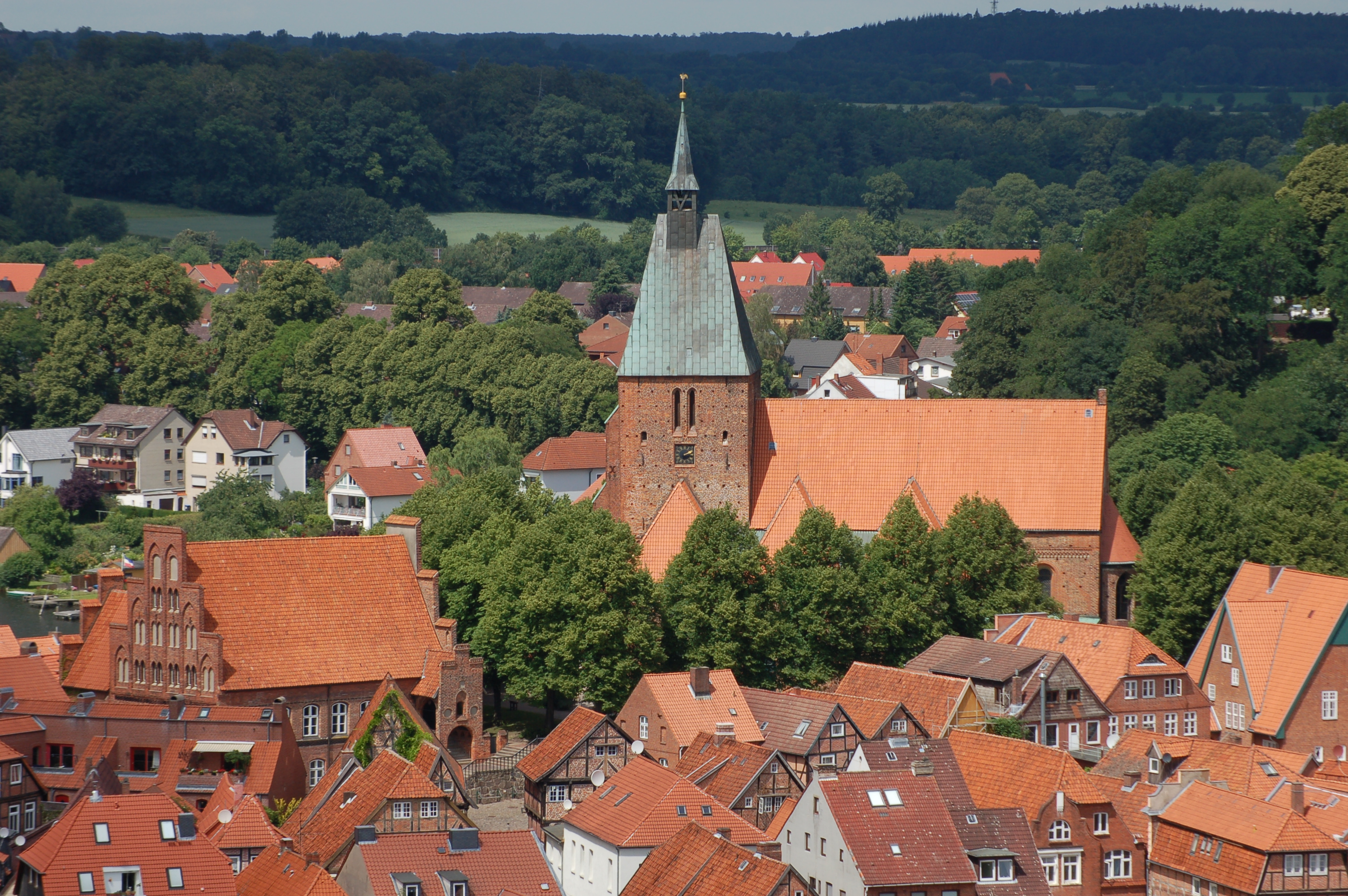 St. Nicolai und das alte Rathaus in Mölln vom Wasserturm aus.